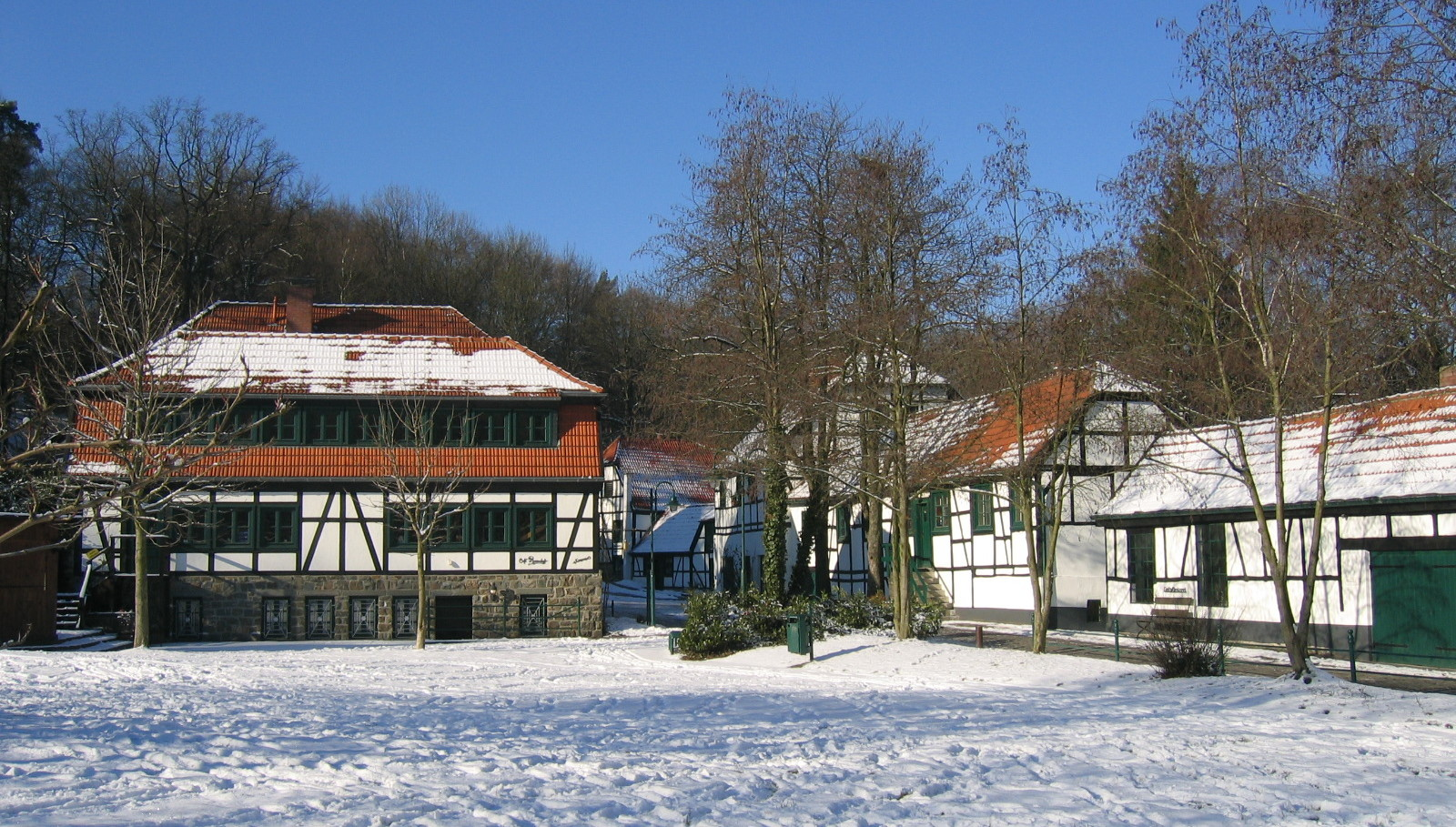 Description: Historische Fabrikenanlage Maste-Barendorf (um 1850) in Iserlohn, links Haus H (Schleifgebäude) Source: selbst fotografiert Date: 29. Jan. 2006 Author: Bubo